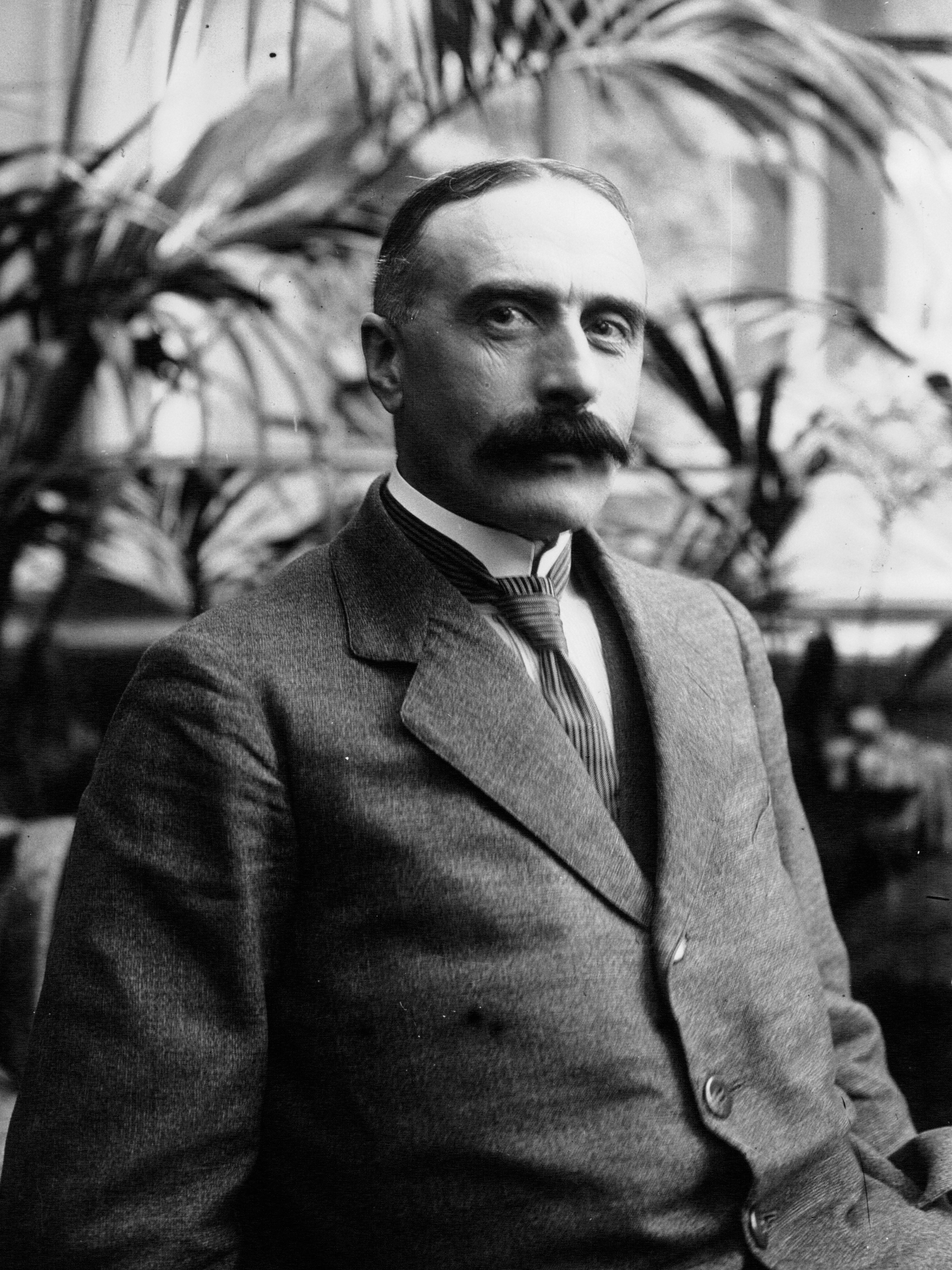 Mr Victor Peytral, sous-secrétaire d'Etat à l'Intérieur : photographie de presse